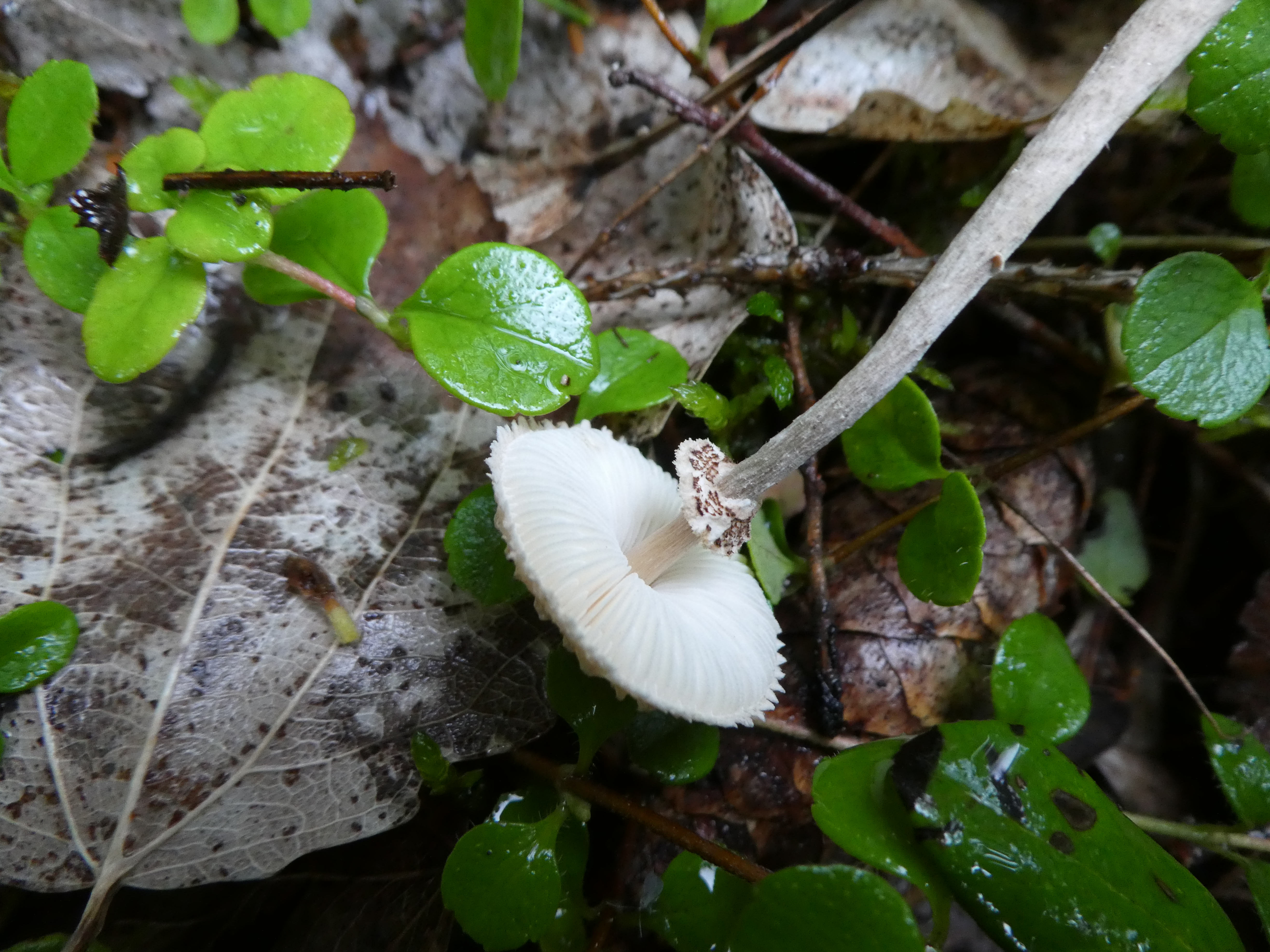 Finland, Kuusamo, Konttainen, kostea polunvarsi